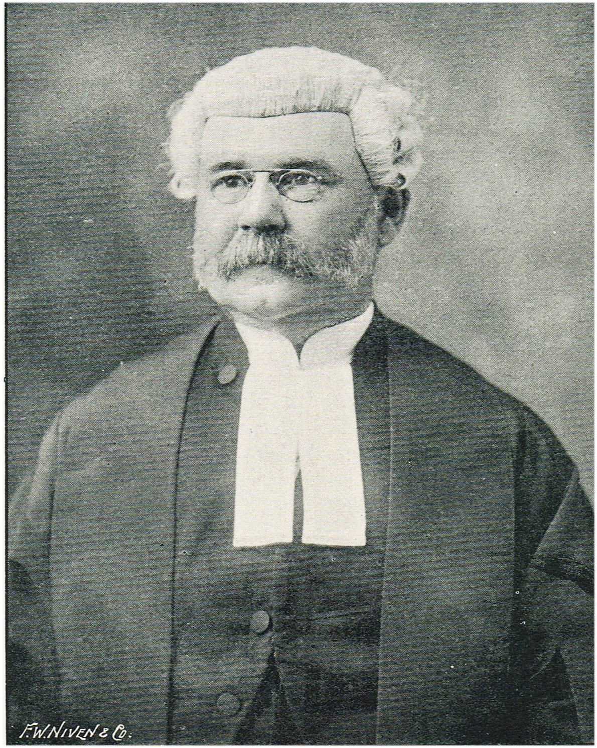 Stephen Henry Parker